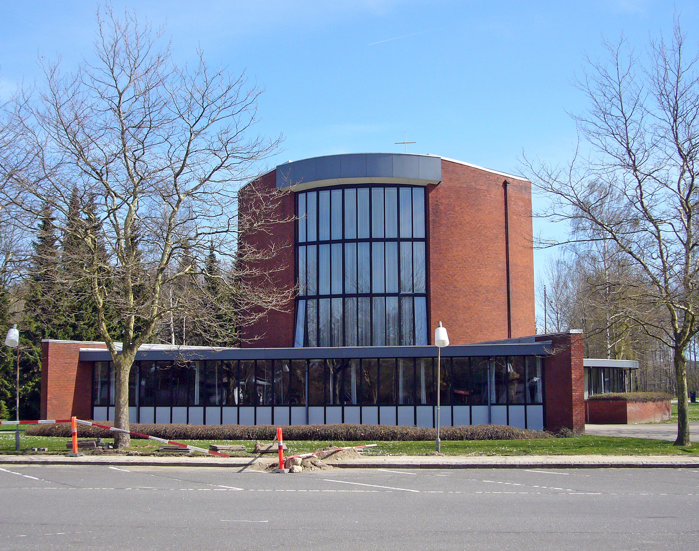 Østervangkirken, Glostrup, Denmark.